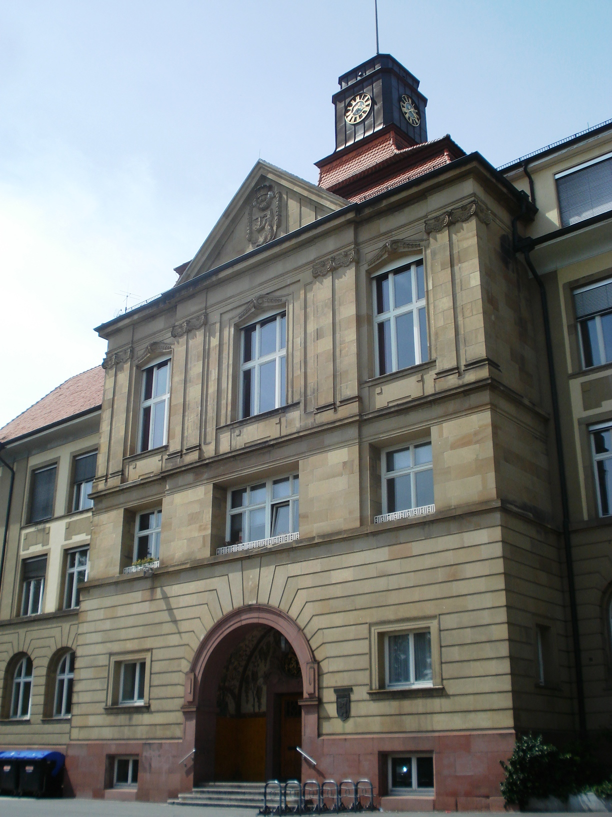 Ansicht von der Alemannestraße her